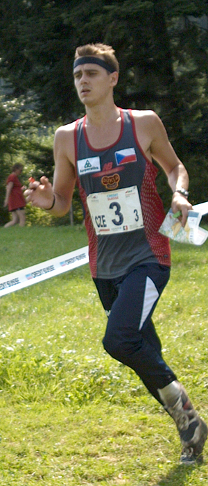 Rudolf Ropek na doběhu závodu štafet MS 2003.